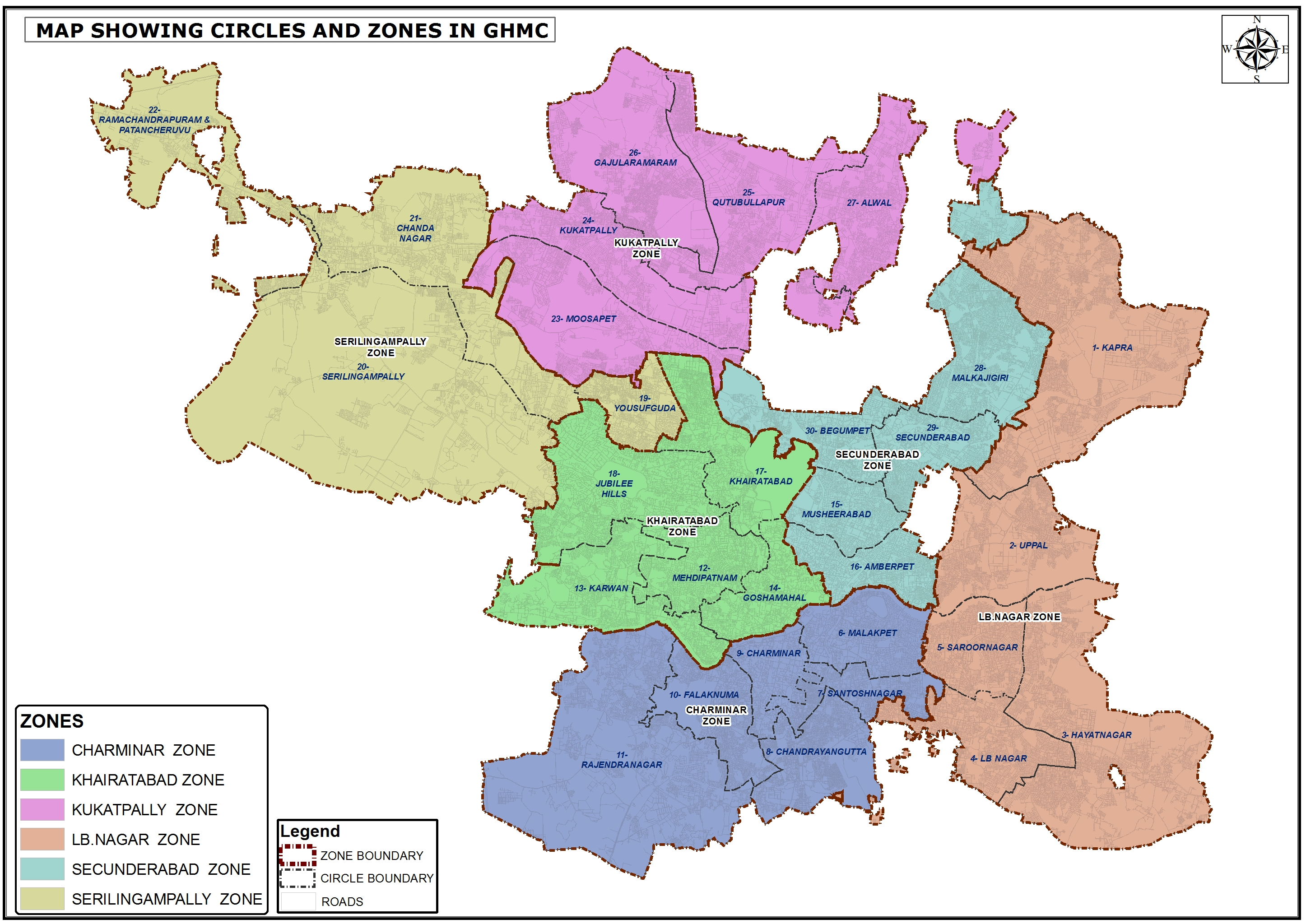 GHMC Zones in 2019